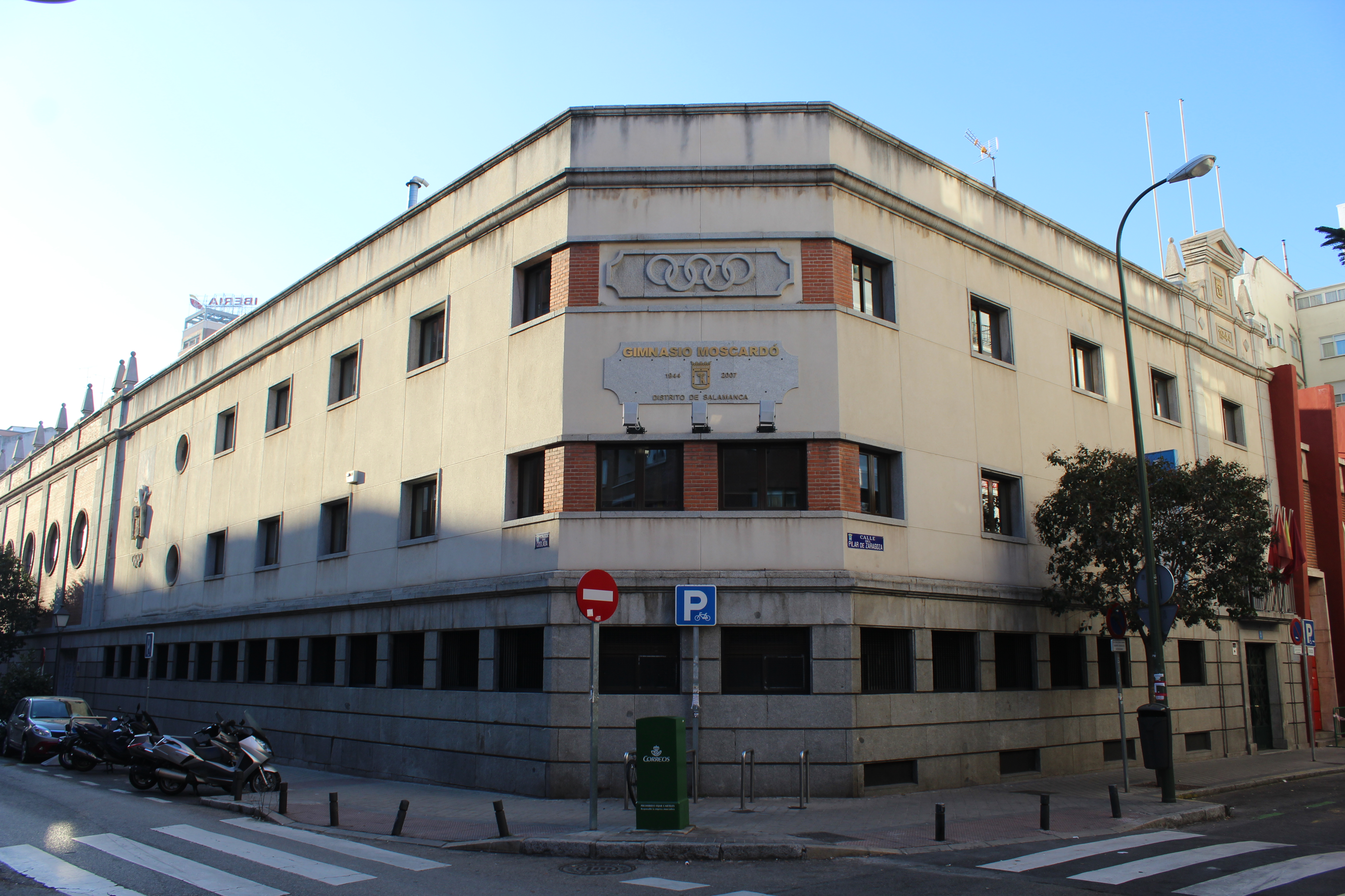 Centro Deportivo Municipal Gimnasio Moscardó